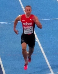 Młodzieżowe Mistrzostwa Europy w Lekkoatletyce U23 w Bydgoszczy 13-16 lipca 2017, finał biegu na 200 m mężczyzn